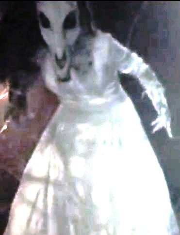 La Cegua, monstruo espectral de la mitología centroamericana, se presenta ante los hombres por los caminos solitarios como una hermosa mujer que los seduce y luego se transforma en un horripilante ser con cabeza de calavera de caballo.